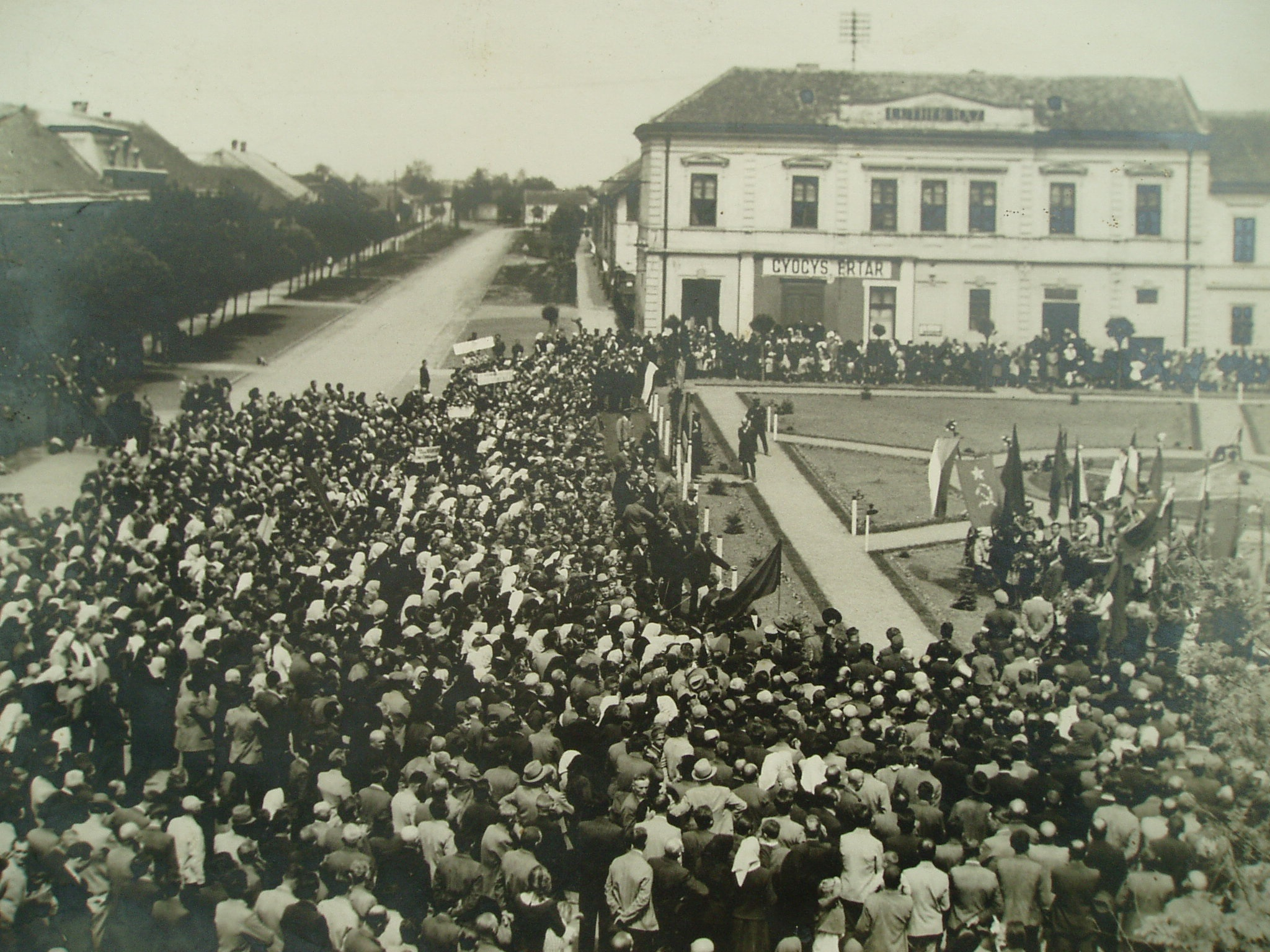 Oslavy 200 rokov od založenia Slovenského Komlóša